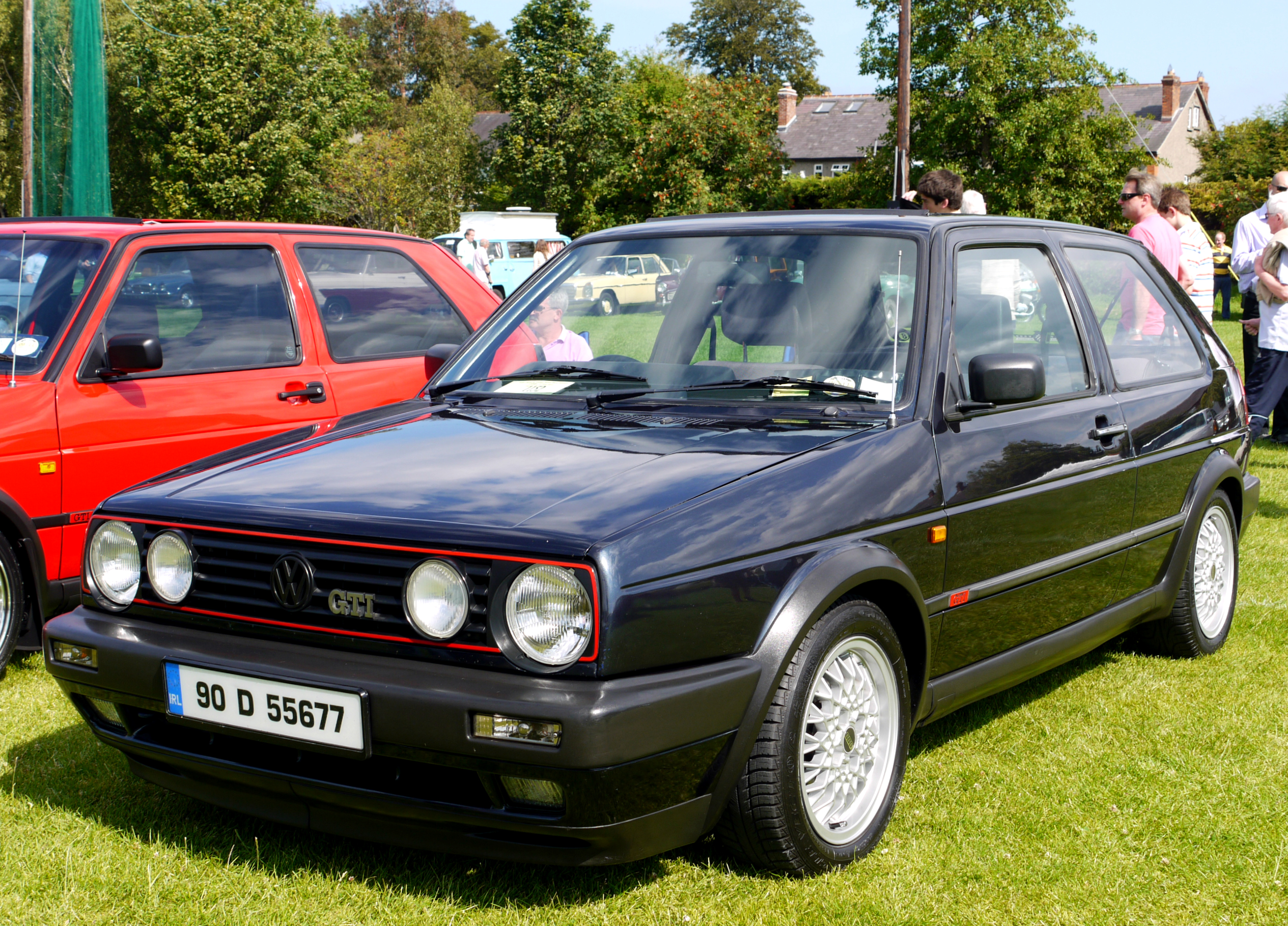 1990 Volkswagen Golf GTI Mk II.